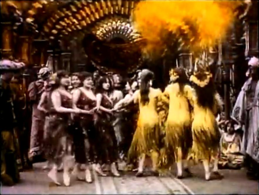 Movie finale